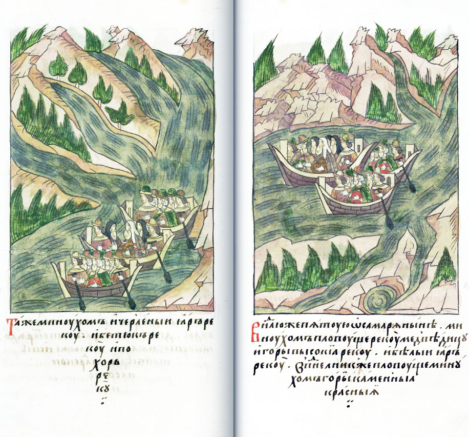 ЛИЦЕВОЙ ЛЕТОПИСНЫЙ СВОД: Также минули и реку Черленый Яр, и Бетюк- реку, и Похорьреку. В неделю же пятую о Самаряныне минули, плывя, реку Медведицу и реку Горы Высокие, и реку Белый Яр. В понедельник же, плывя, минули горы Каменные красные.